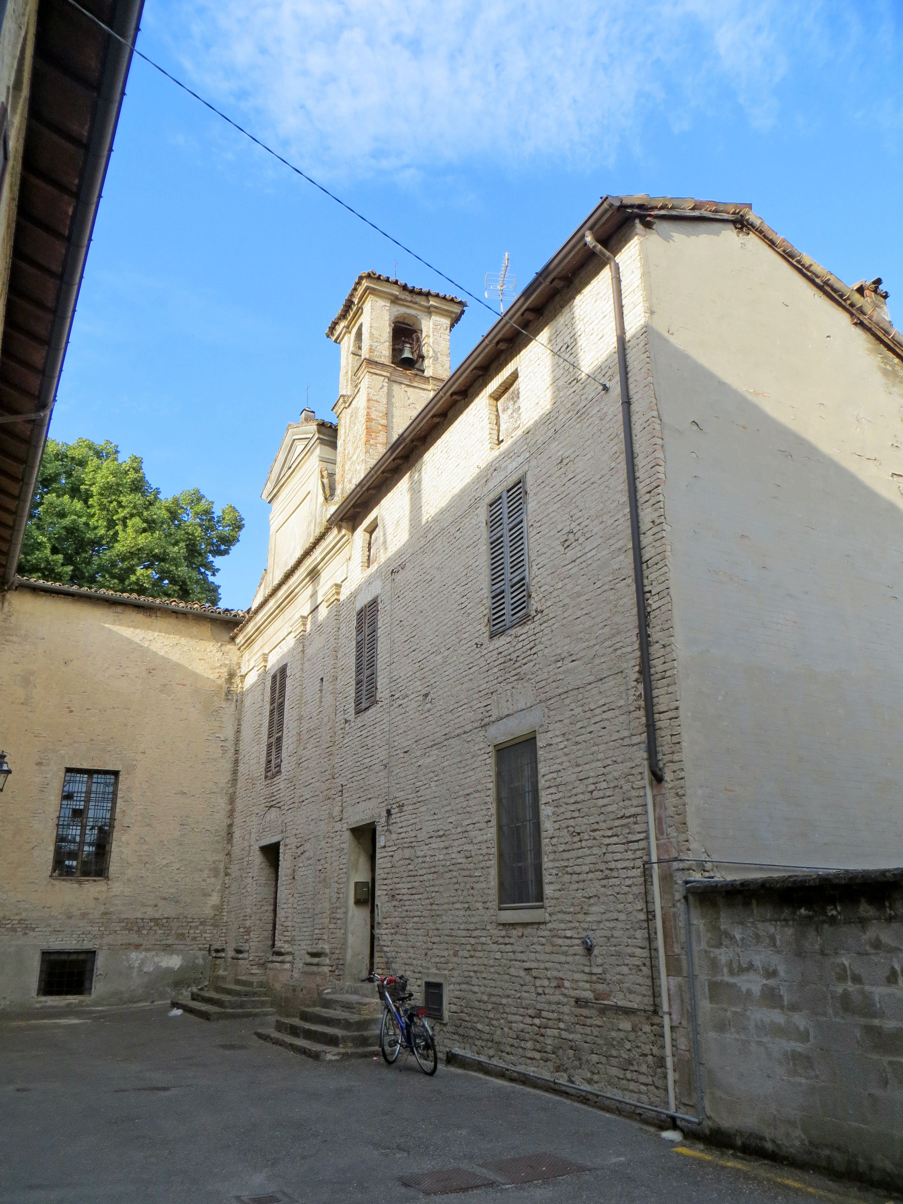 Rocca Meli Lupi (Soragna) - cappella di Santa Croce